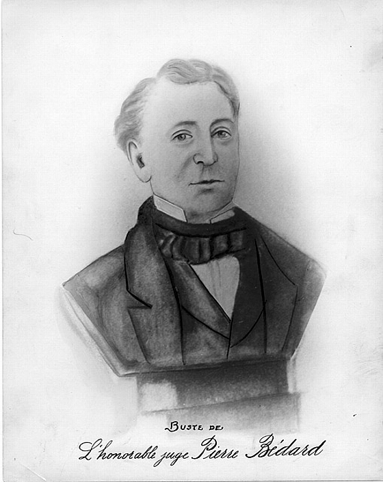 Buste de Pierre-Stanislas Bédard